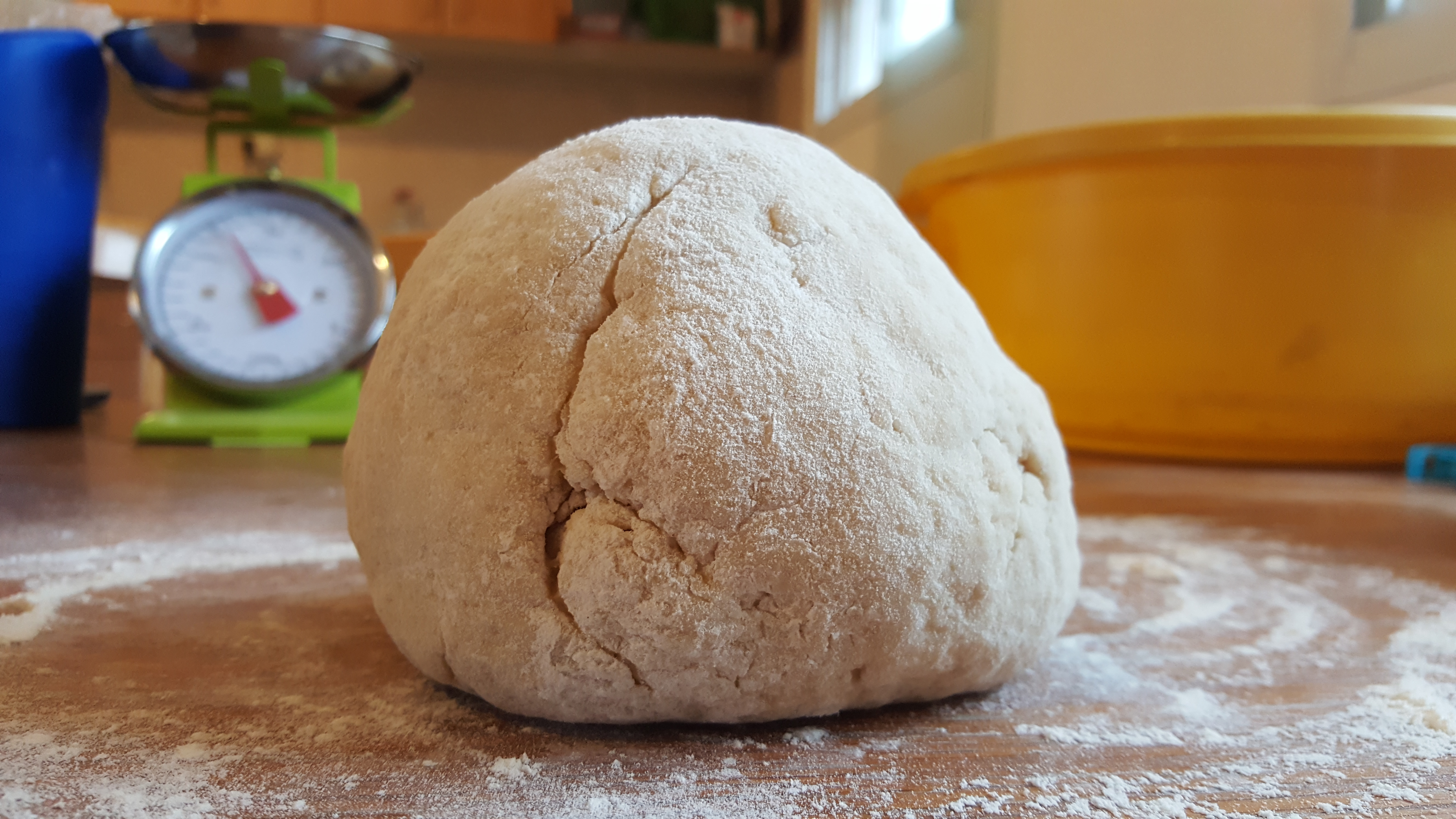 בצק